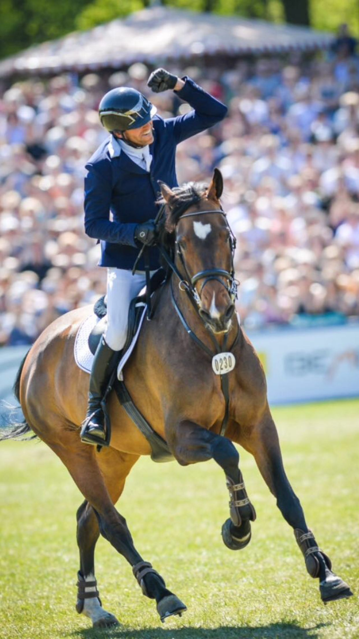 Zera aus der Zucht von Harm Thormählen auf dem Hamburger Derby 2016.